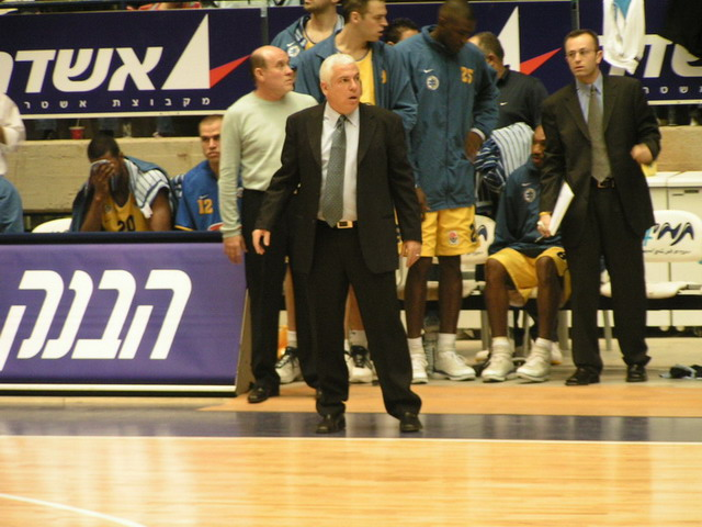 פיני גרשון, המאמן שהביא למכבי 3 גביעי אירופה צולם על-ידי אבי קדמי This picture was taken by Avi Kedmi